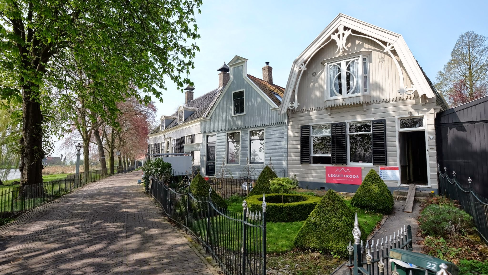 1151 Broek in Waterland, Netherlands